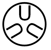 Markenzeichen der Vereinigten Stahlwerke AG